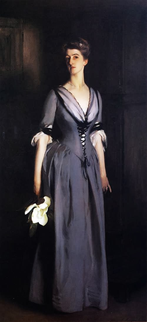 Mrs Albert Vickers by John Singer Sargent